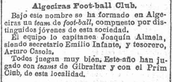 Noticia de la creación del equipo Algeciras Foot-Ball Club en la localidad española de Algeciras en el Heraldo de Madrid el 7 de junio de 1909.